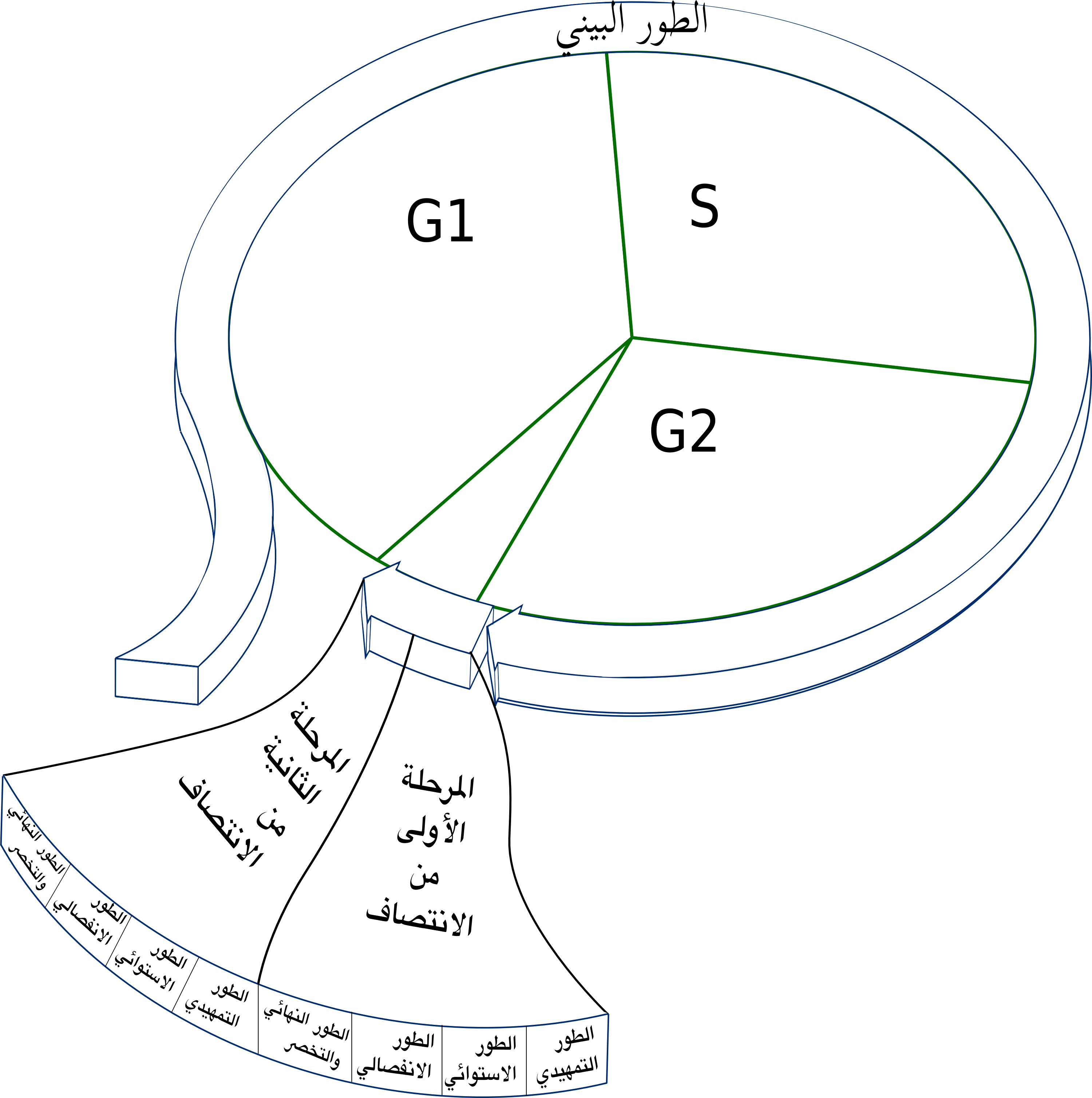 صورة توضح الطور البيني قبل الانتصاف، وتوضح أيضاً أن عملية الانتصاف ليست دوارة؛ بمعنى أن الخلية البنت لن تكرر دورة الخلية الأم